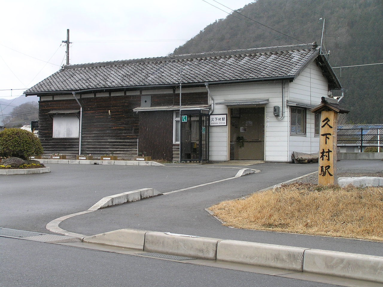 西日本旅客鉄道（JR西日本）加古川線久下村駅丹波市